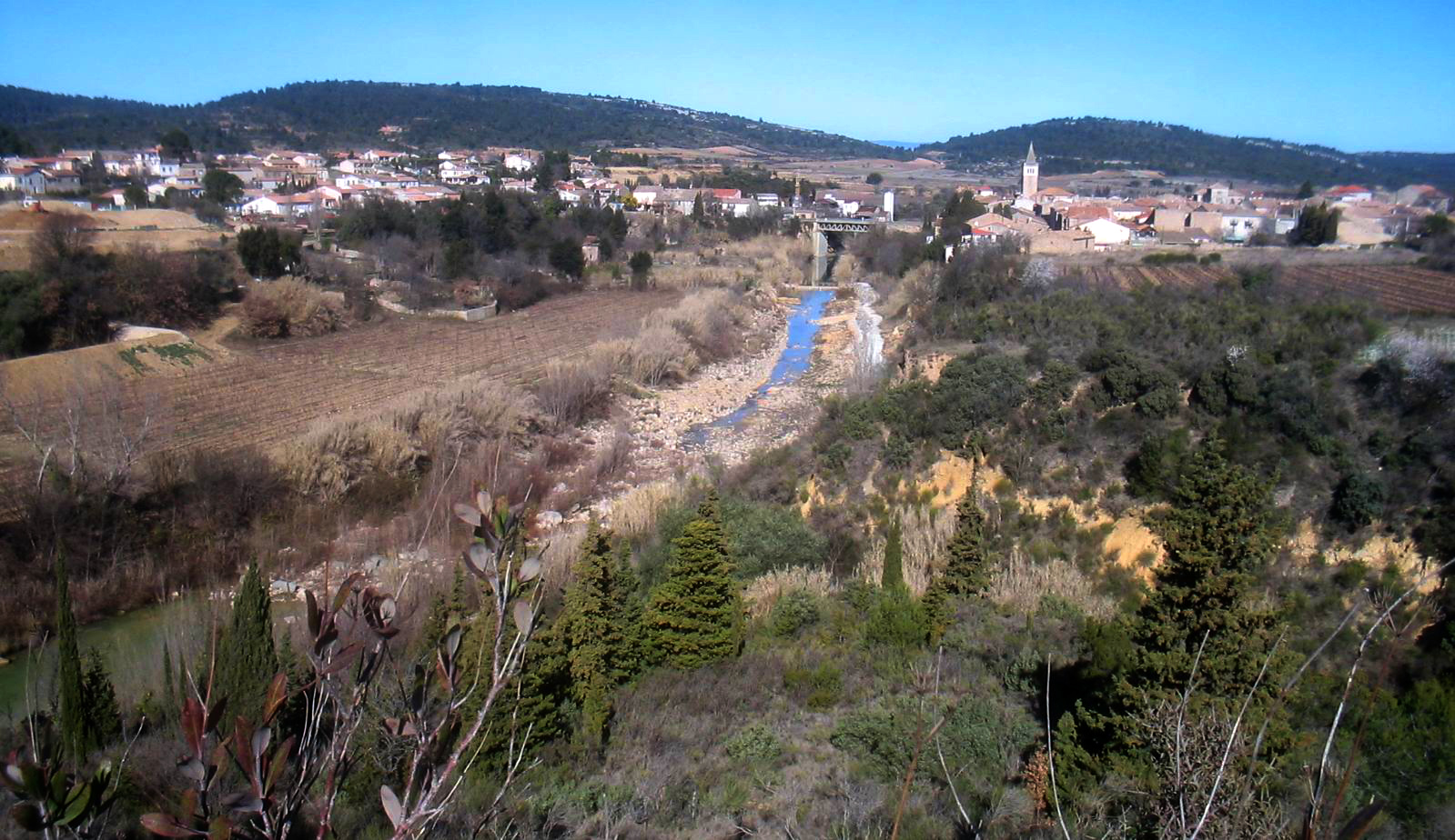 Saint-Laurent-de-la-Cabrerisse et la Nielle : vue depuis les garrigues